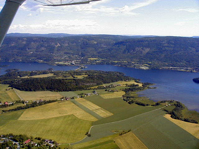 Kroksund i Hole (Buskerud)